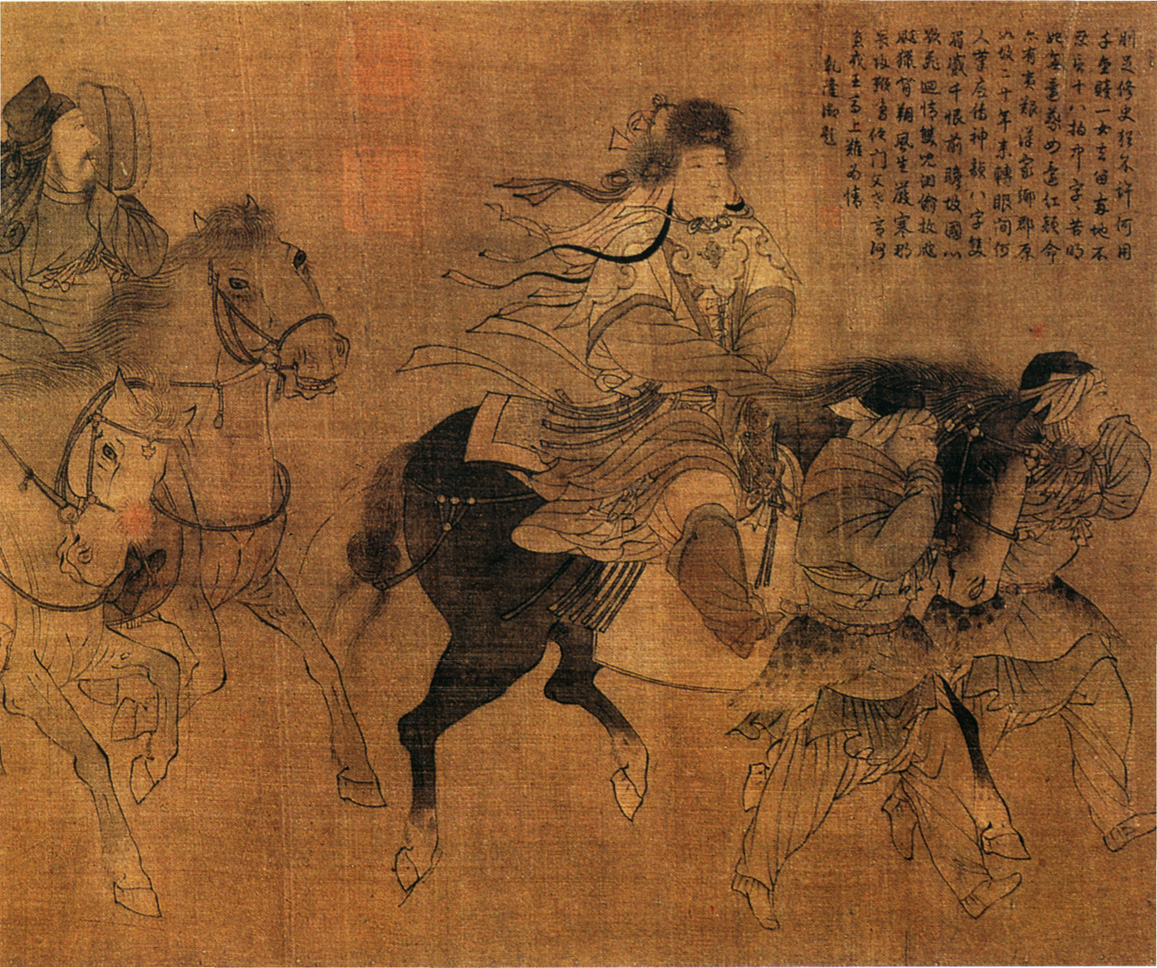 張瑀所繪《文姬歸漢圖》